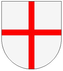 Kruis van Sint-Joris: Eigen tekening (dat was zwoegen...!) Robert Prummel 2007